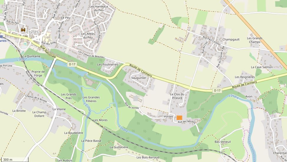 Emplacement du prieuré Saint-Pierre de Vontes (en orange) à Esvres This map may be incomplete, and may contain errors. Don't rely solely on it for navigation.